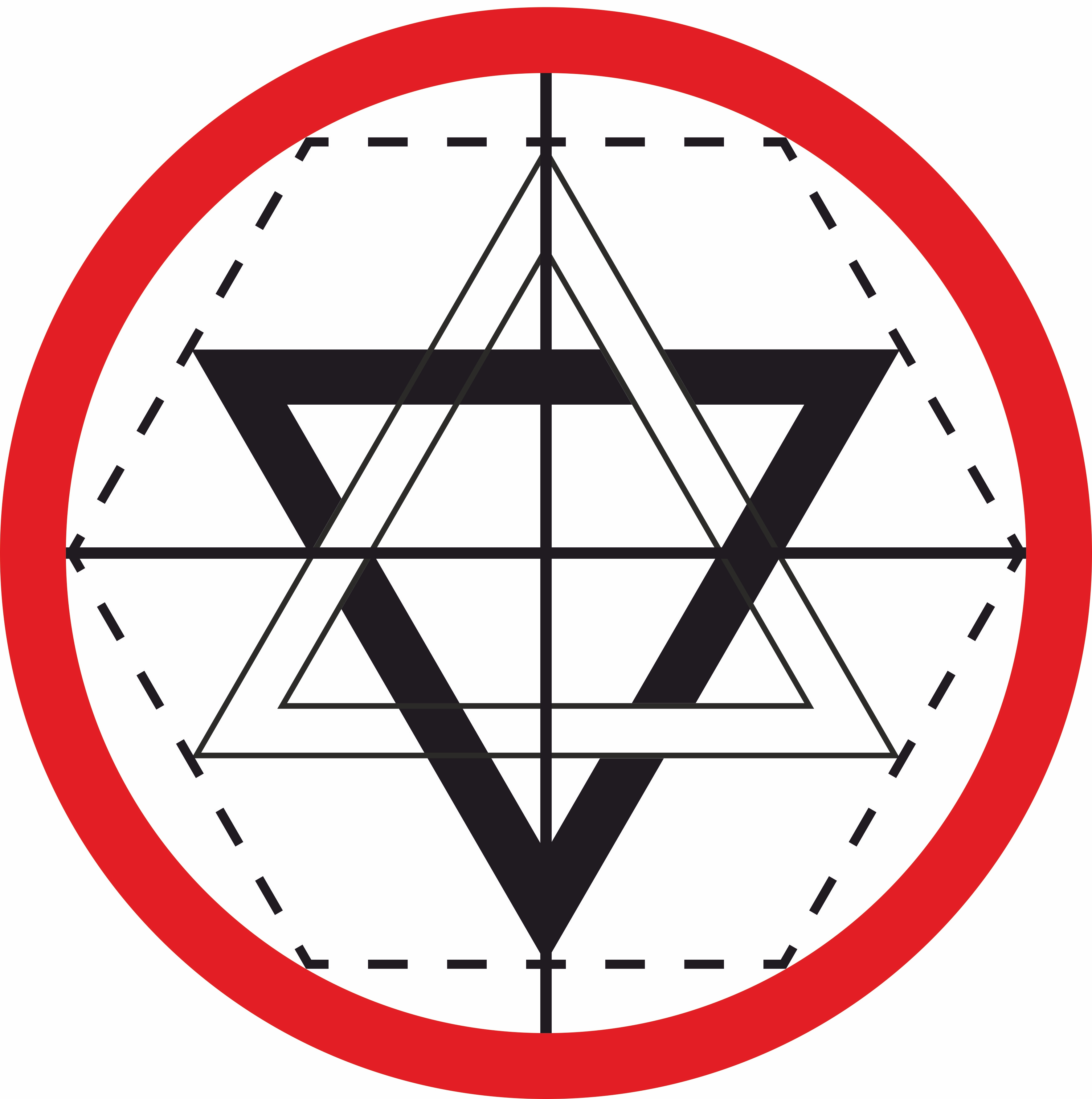 Пантакль Ордену Мартіністів